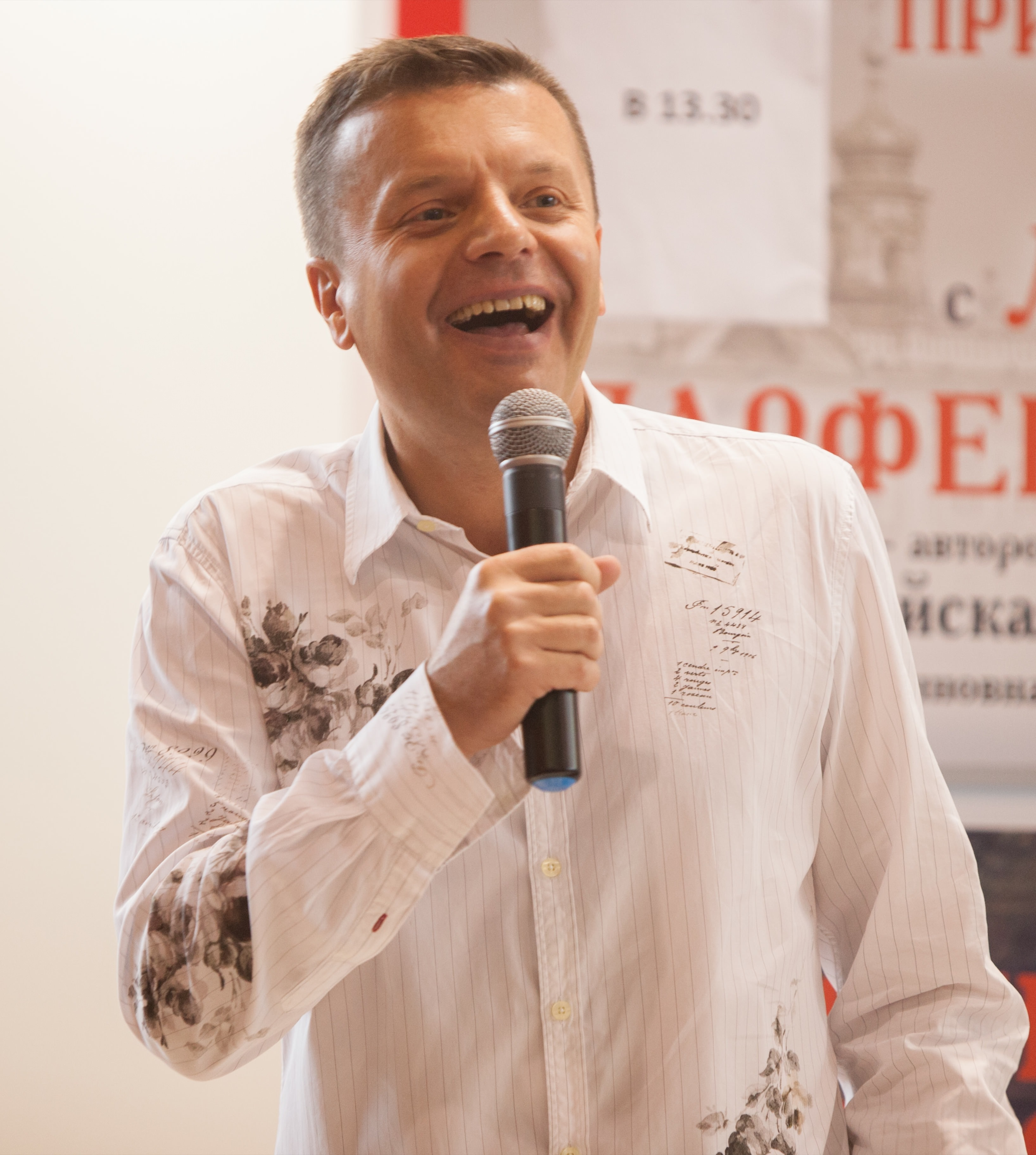 VDNKh (All-Russian Exhibition Center); Выставка достижений народного хозяйства (ВДНХ); Ausstellung der Errungenschaften der Volkswirtschaft (WDNCh)